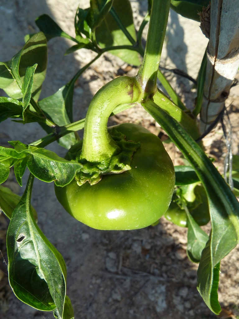 Capsicum annuum cv. Pimiento Bola/Ñora : Fruto inmaduro in situ - Camino del Canalillo, Albatera (Alicante, España).